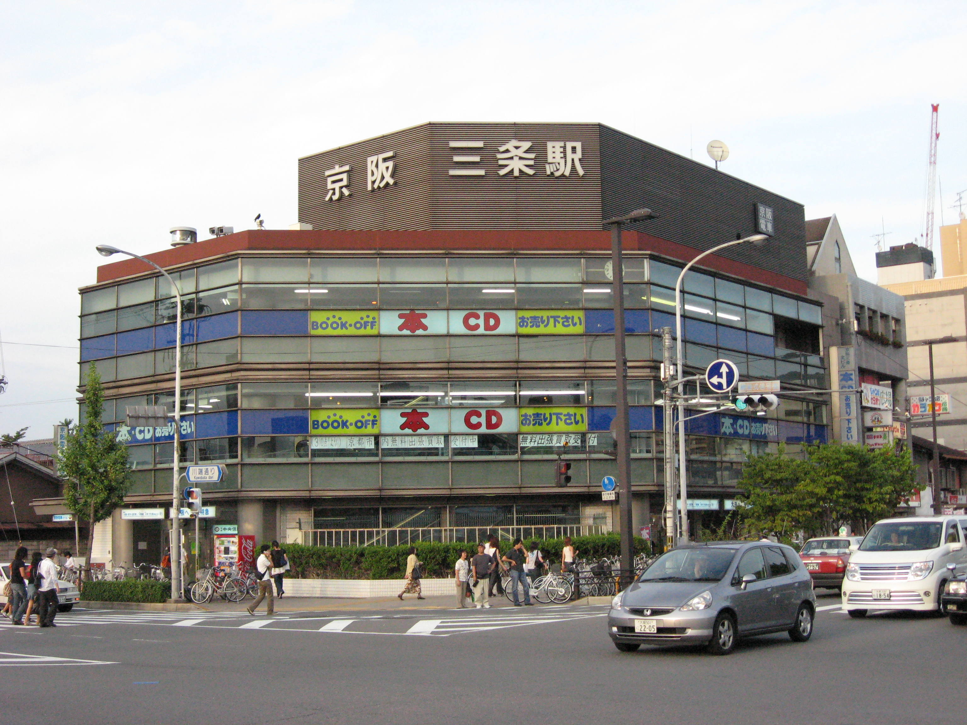 Keihan Sanjo Station Building